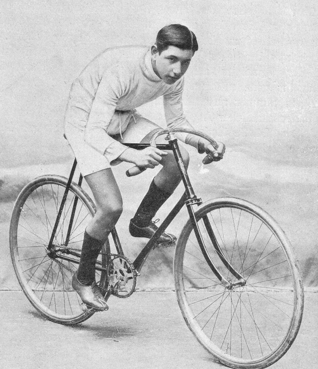 Edouard Taylor, englischer Radrennfahrer